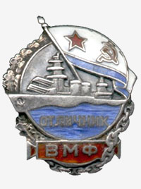 Знак “Отличник ВМФ”